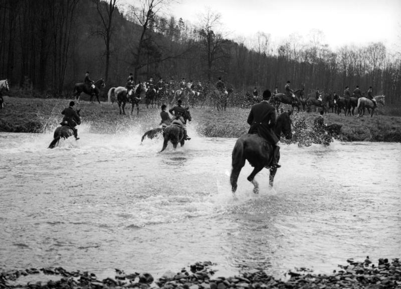 Schloß Auel an der Agger, den 19.11.1960 Hubertus-Jagd bei Schloß Auel an der Agger im Rheinland, veranstaltet vom Düsseldorfer Reiterverein